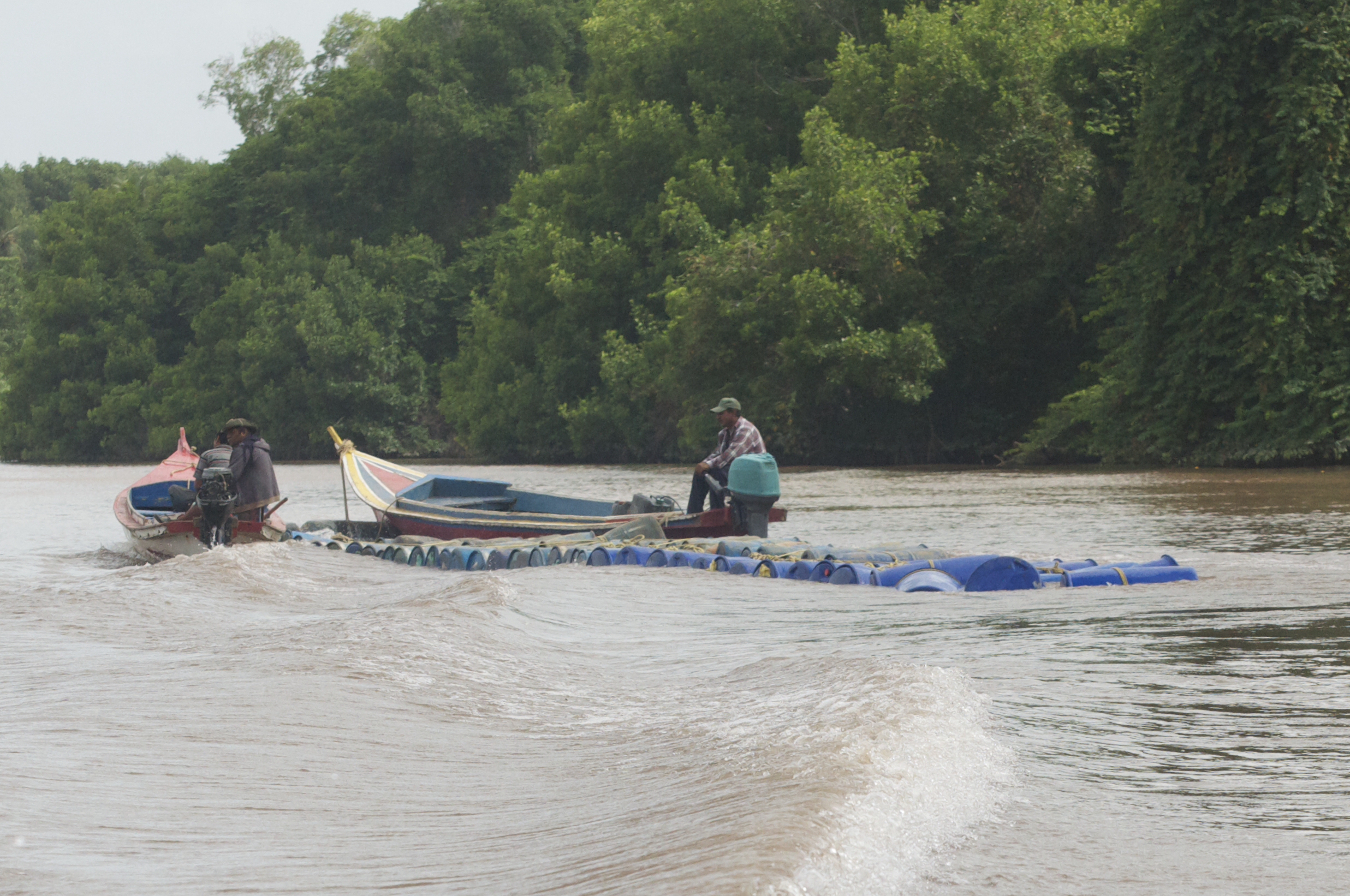 Rio limon